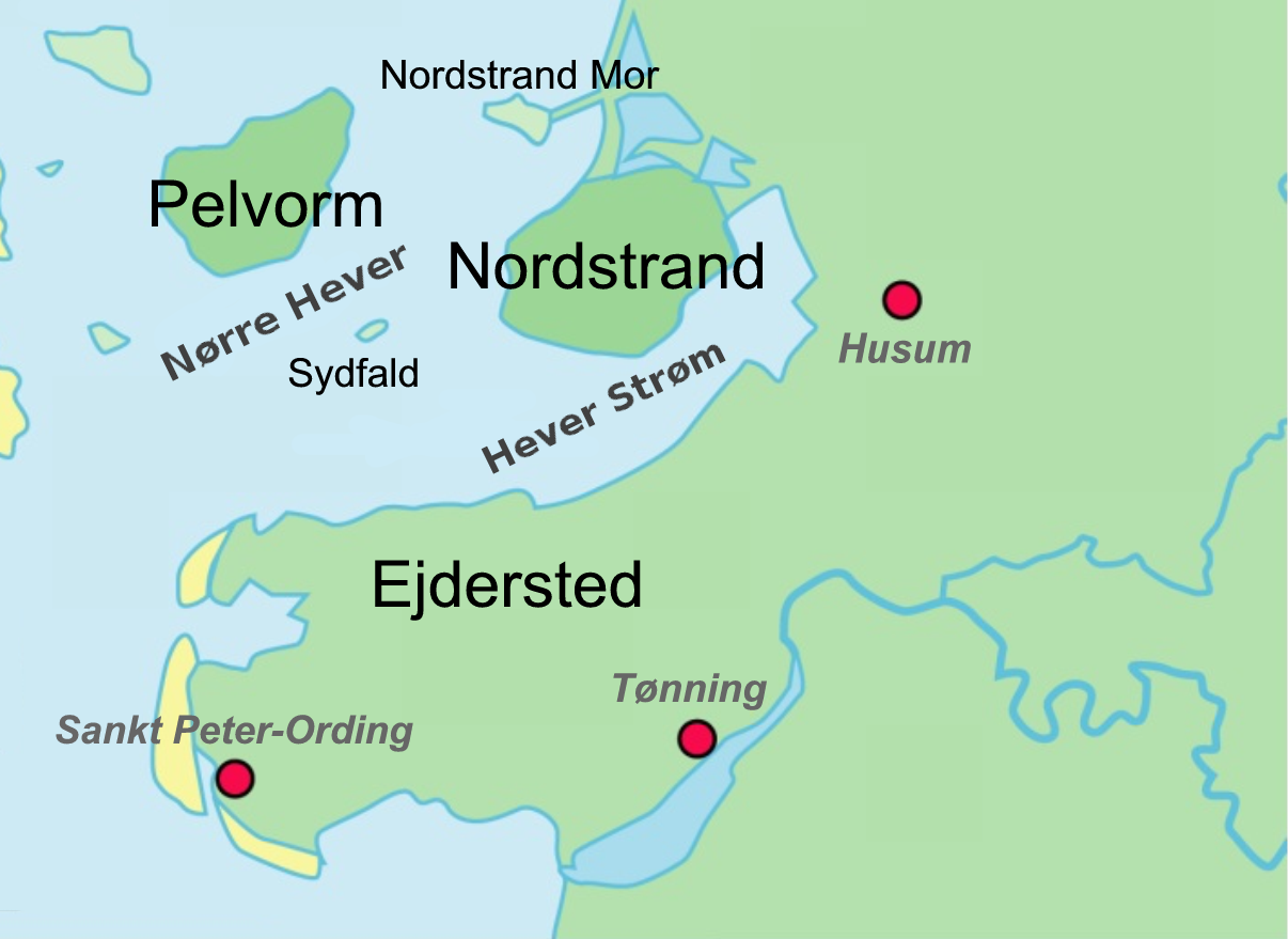 Hever Strømmen